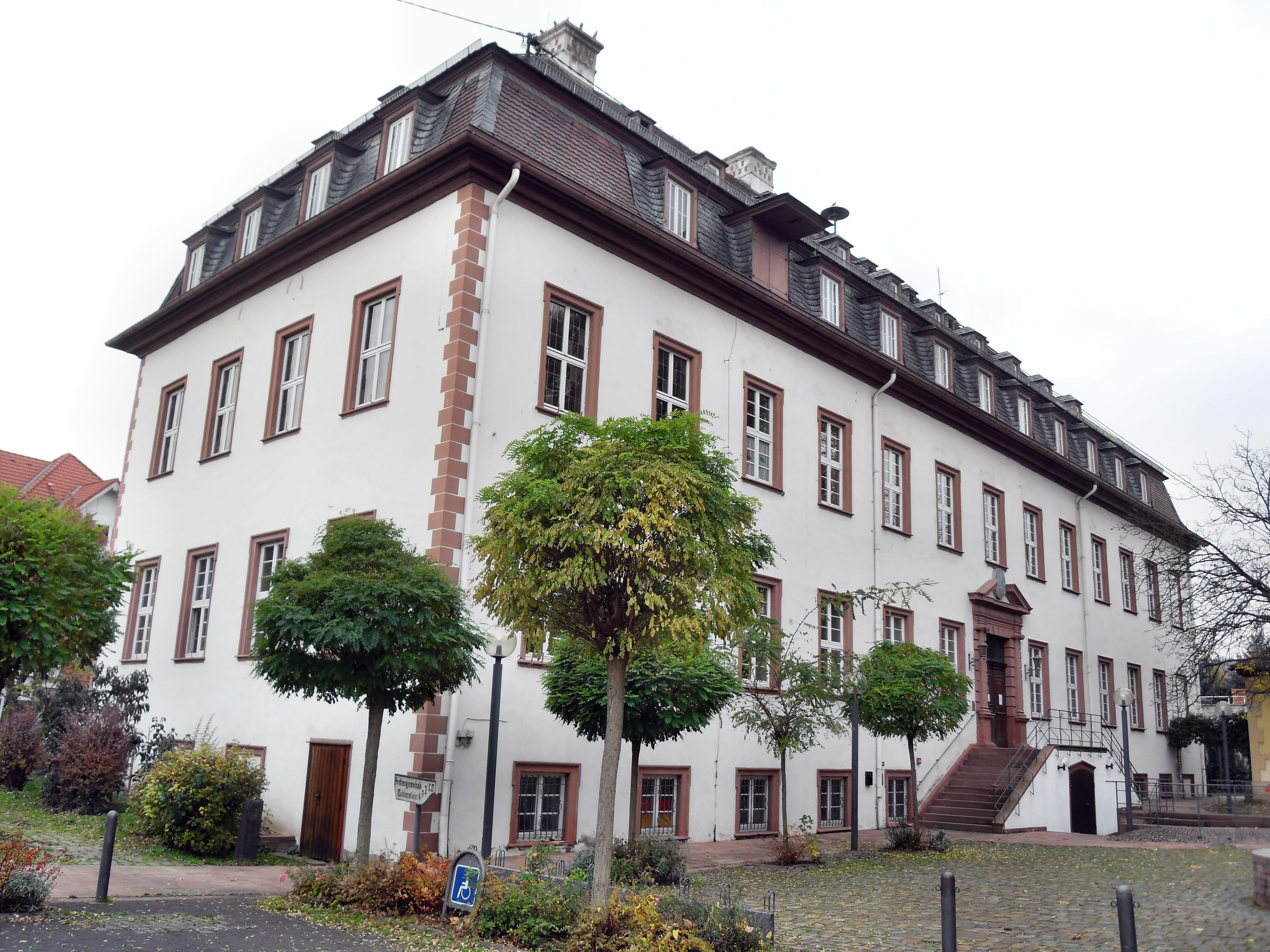 Guntersblum: Rathaus, auch Leininger Schloss genannt